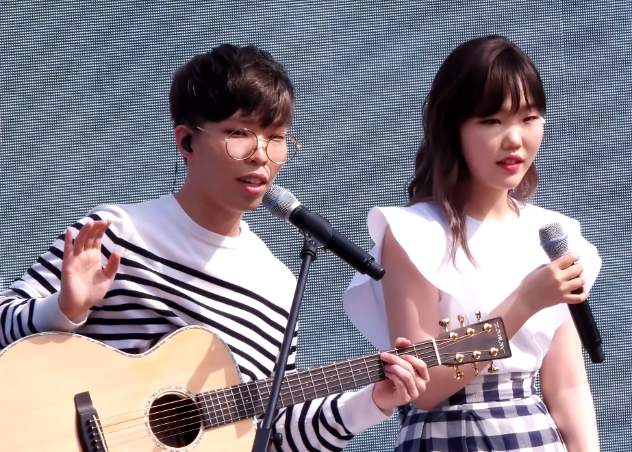 2016년 5월 5일 서울숲 청음회에서 악동뮤지션.